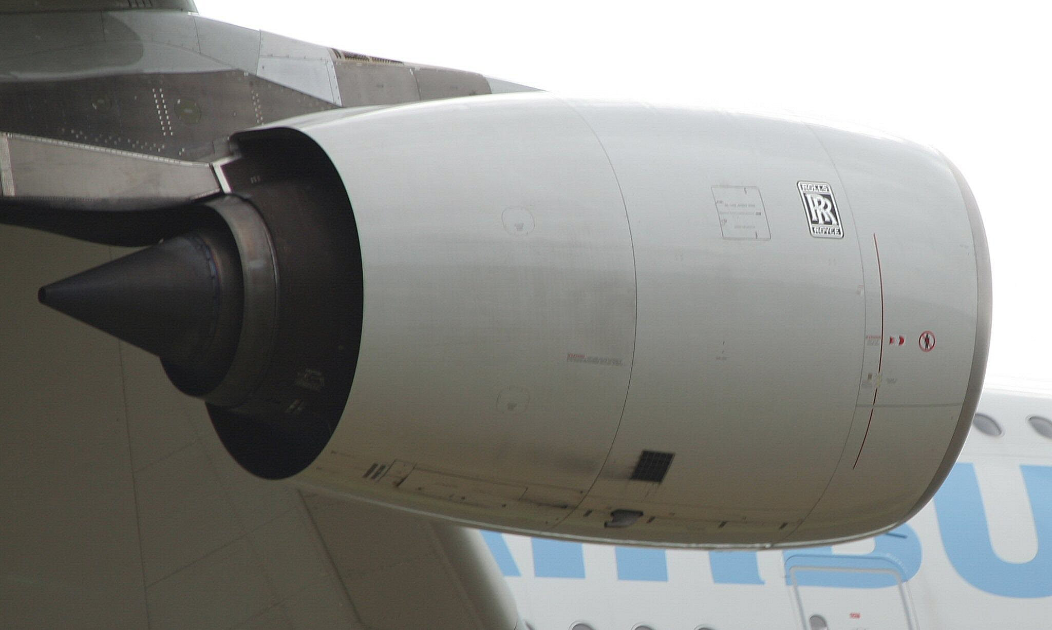 Triebwerk A 380 bei Wirbelschleppentests im Anflug auf den Sonderflughafen Oberpfaffenhofen